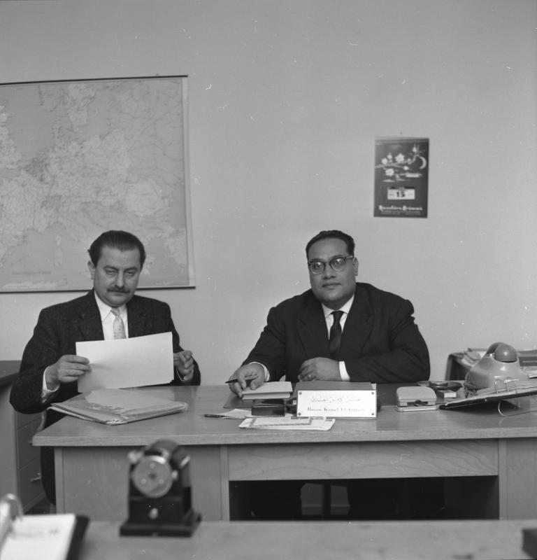 Dr. Ibrahim Abdel Rahman, Kairo Direktor des "Institute of National Planning" in Bonn